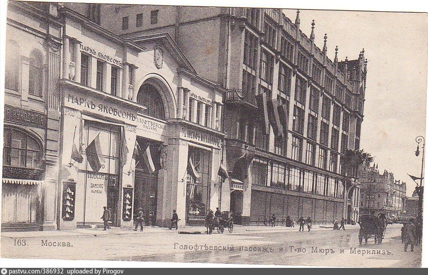 Голофтеевский (Голицынский) пассаж и т-во «Мюр и Мерилиз». Это старое или новое здание Голофтеевского? Старое сгорело сгорело 24 февраля 1912 года; в 1913 оно было полностью перестроено Рербергом.